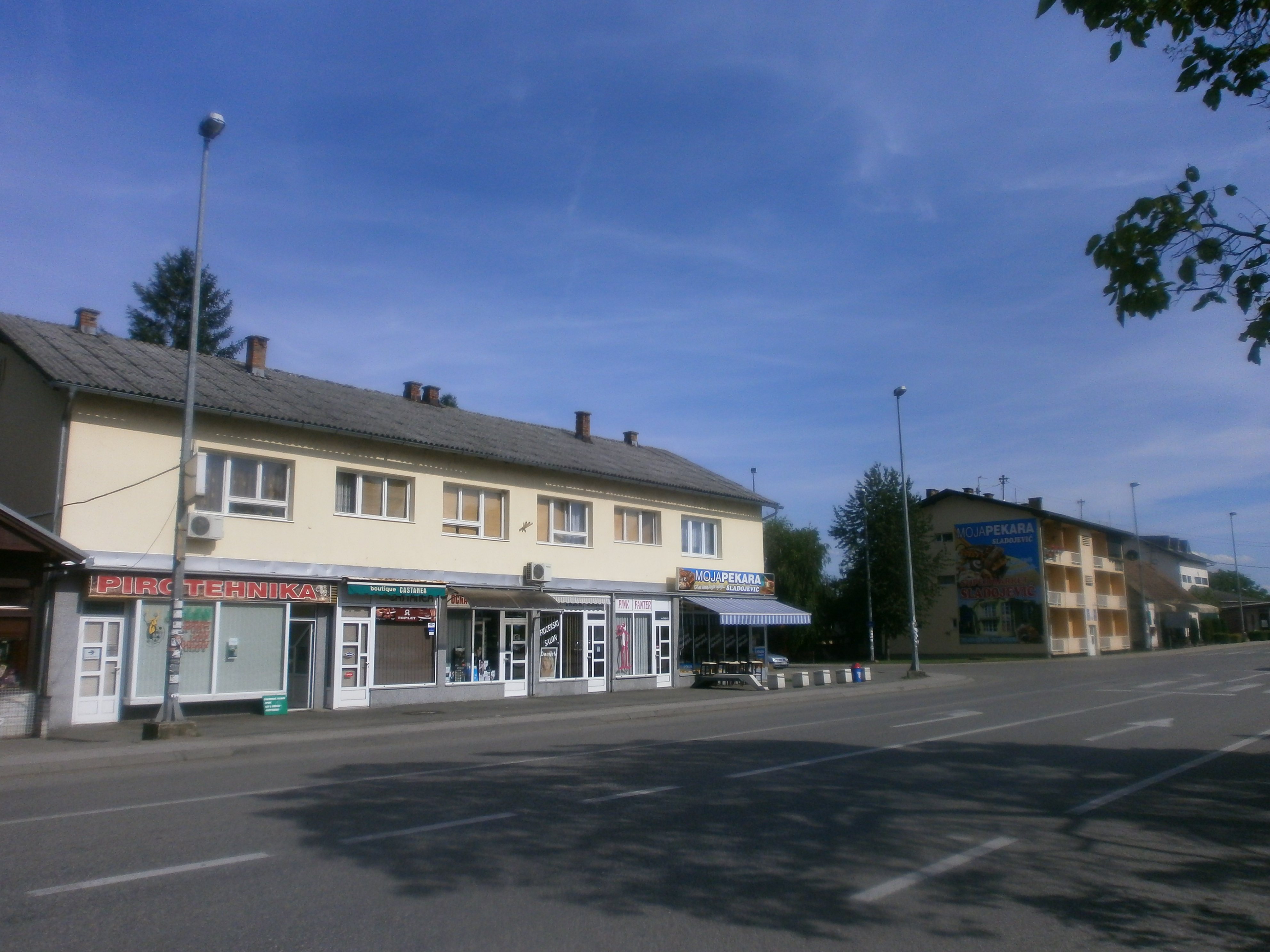 Centar Nove Topole